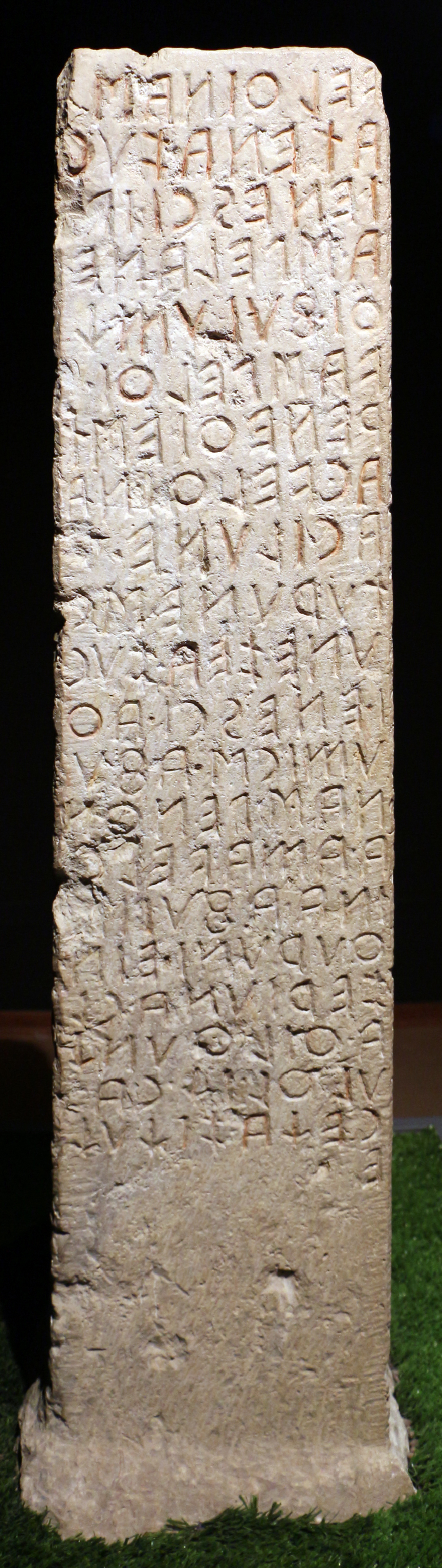 Museo Archeologico Nazionale dell'Umbria This is a photo of a monument which is part of cultural heritage of Italy.